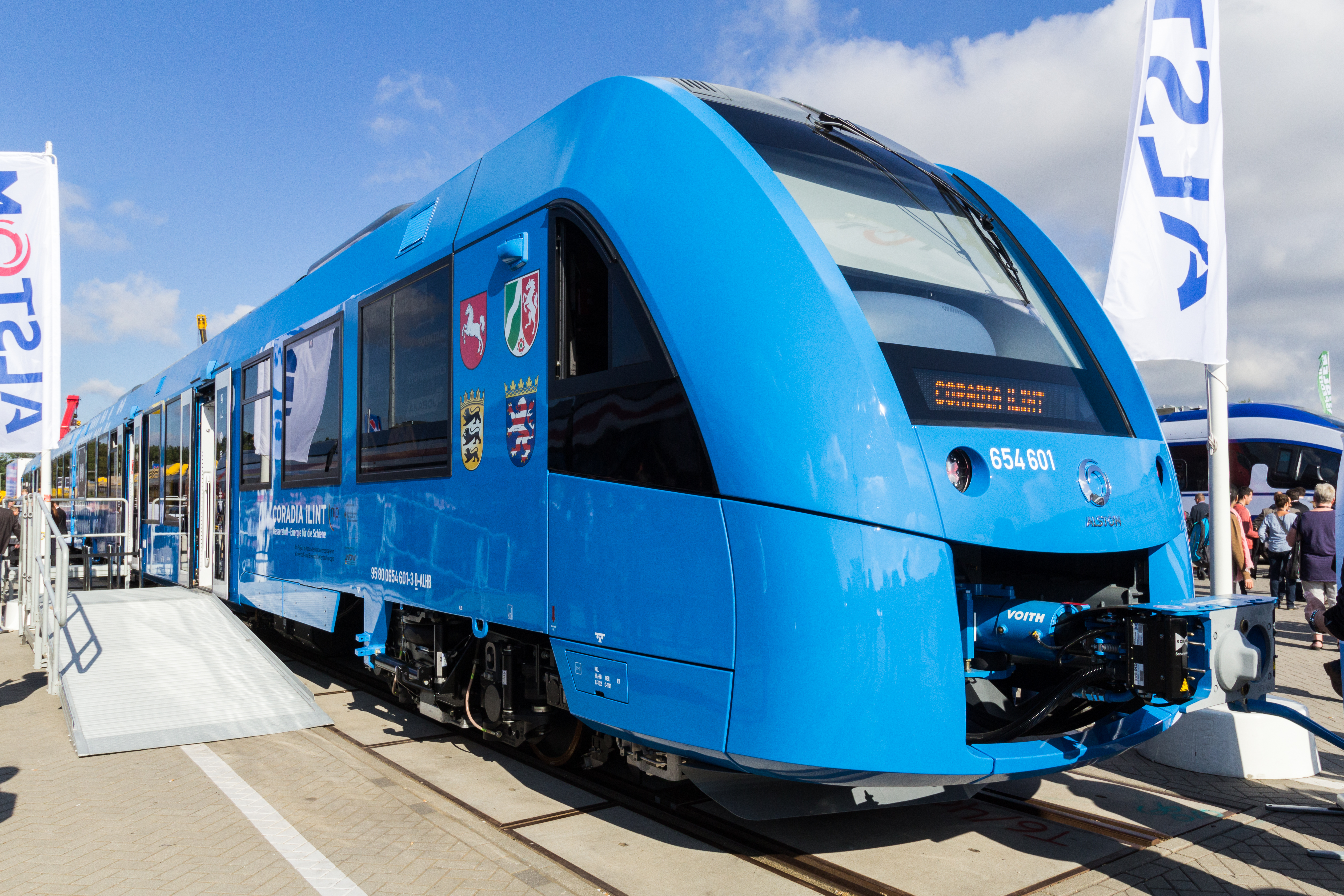 Wasserstoff betriebener Zug Alstom Coradia iLint auf der innoTrans 2016 in Berlin